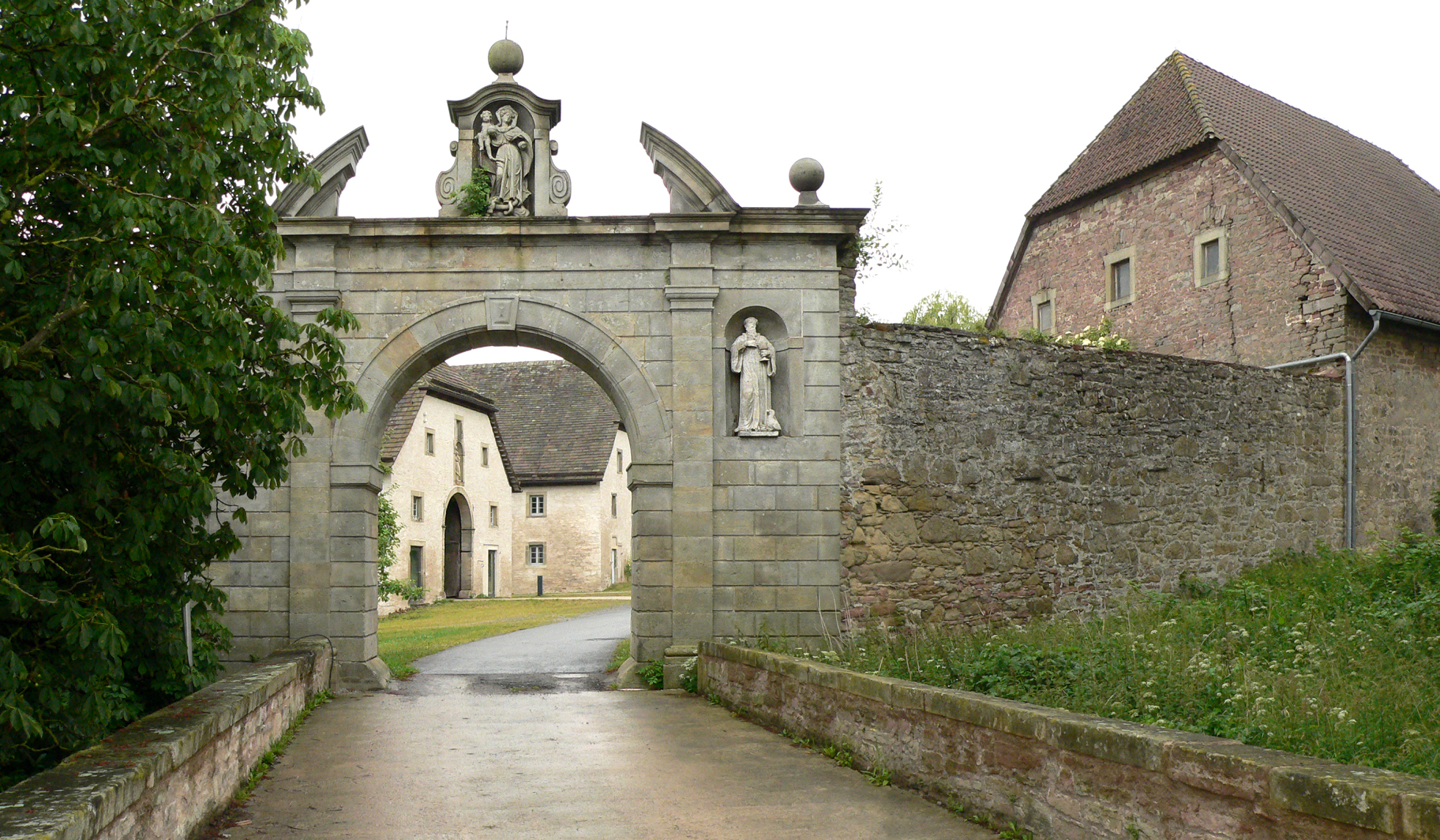 Klosterhoftor der Abtei Marienmünster